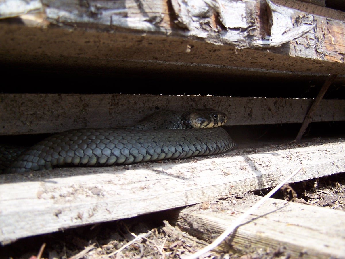 Užovka obojková nalezena pod dřívím v Řešetově Lhotě (okres Náchod).